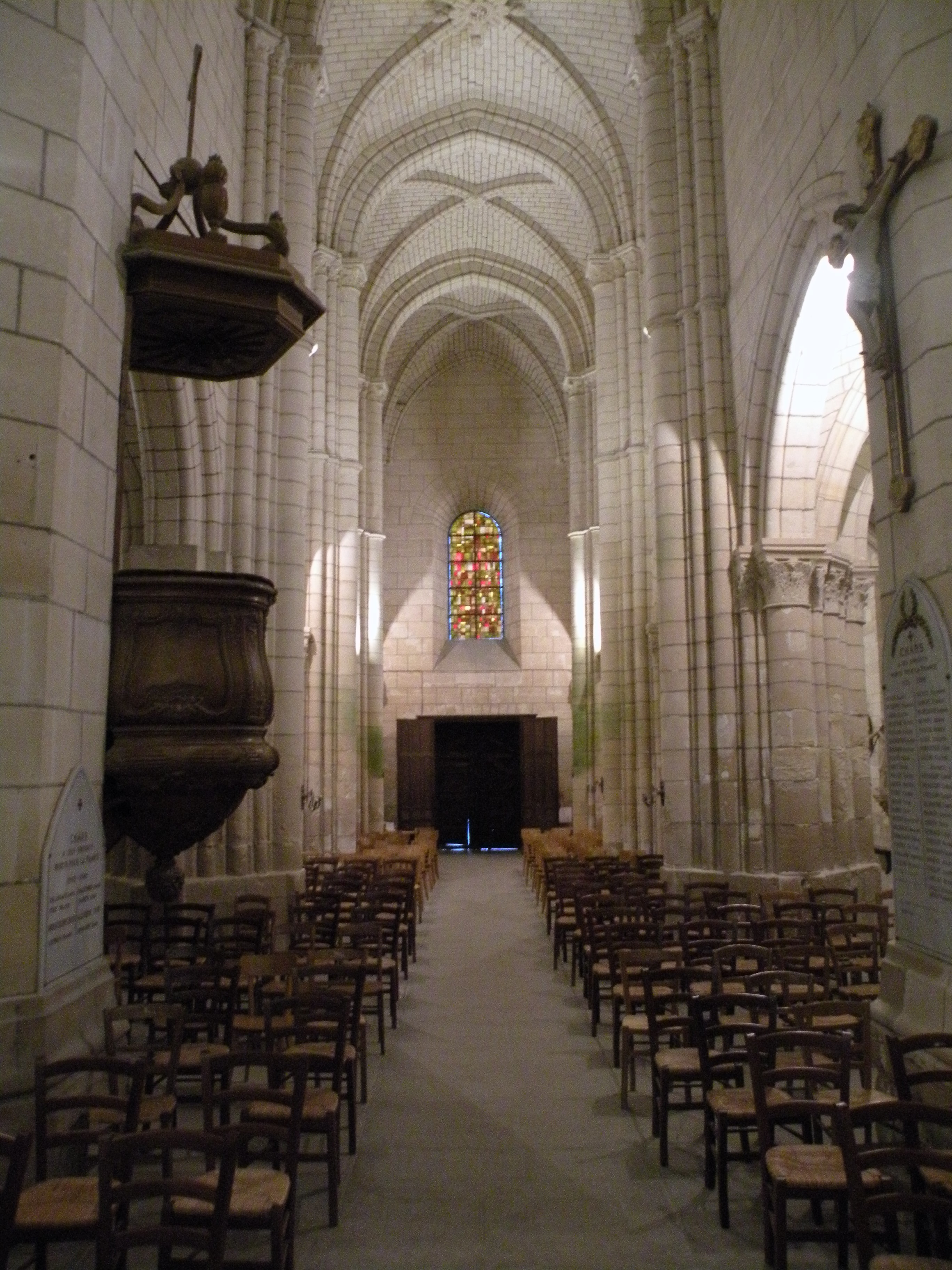 nef Église Saint-Sulpice de Chars